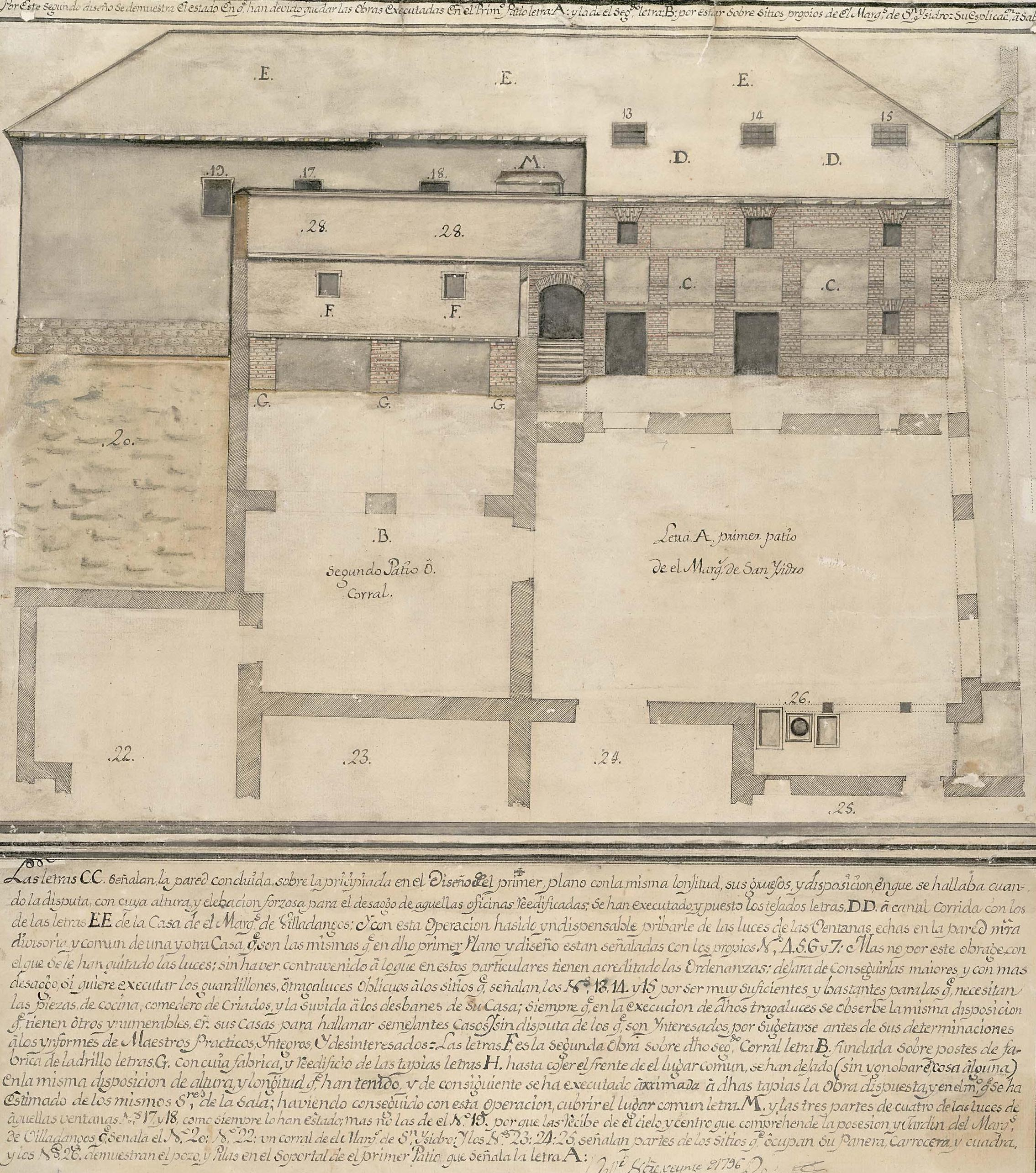 Plano del palacio del marqués de San Isidro en León, limítrofe con el palacio del marqués de Villadangos.